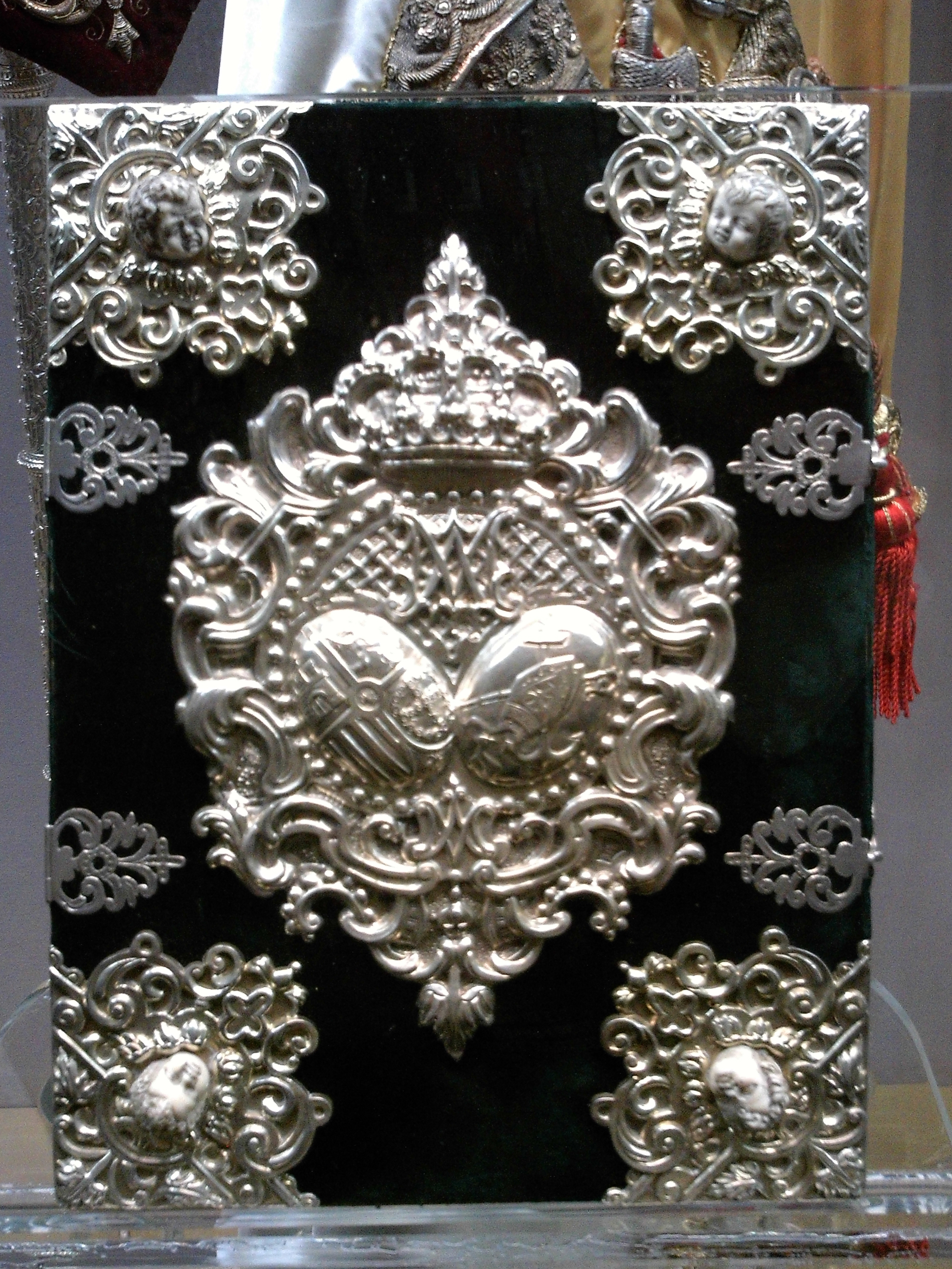 Libro de reglas de la Hermandad de la Macarena (Fernando Marmolejo Camargo, 1949). Museo de la Hermandad de la Macarena. Sevilla, Andalucía, España.